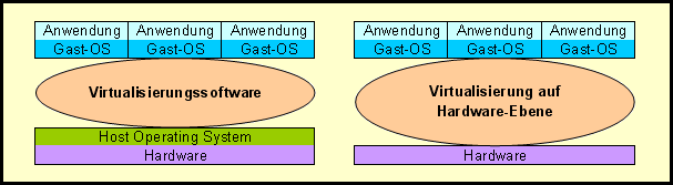 Grafik zum Vergleich zwei verschiedener Virtualisierungsmethoden